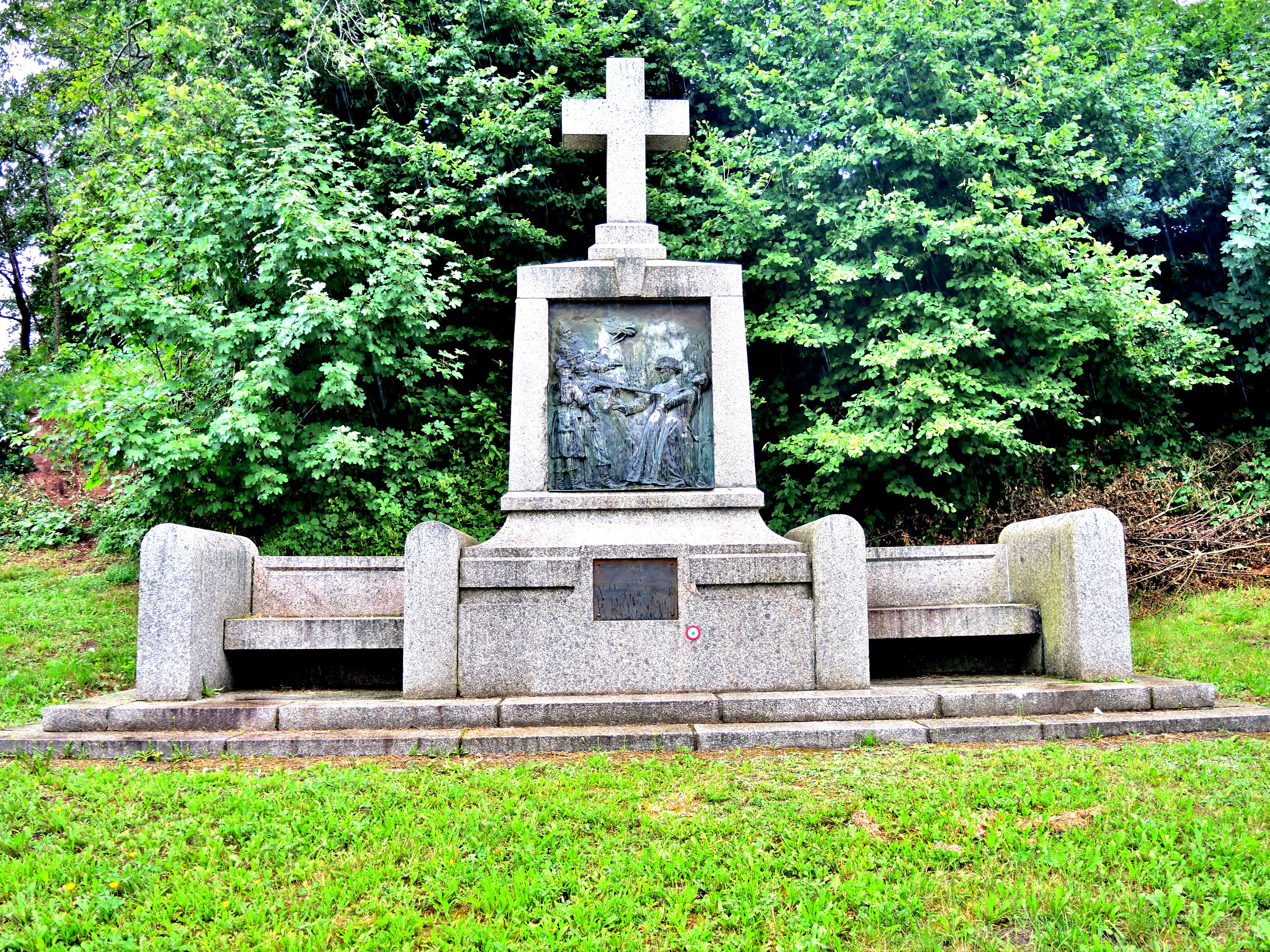 Monument-stèle du curé Miclo à Grosmagny. Territoire de Belfort